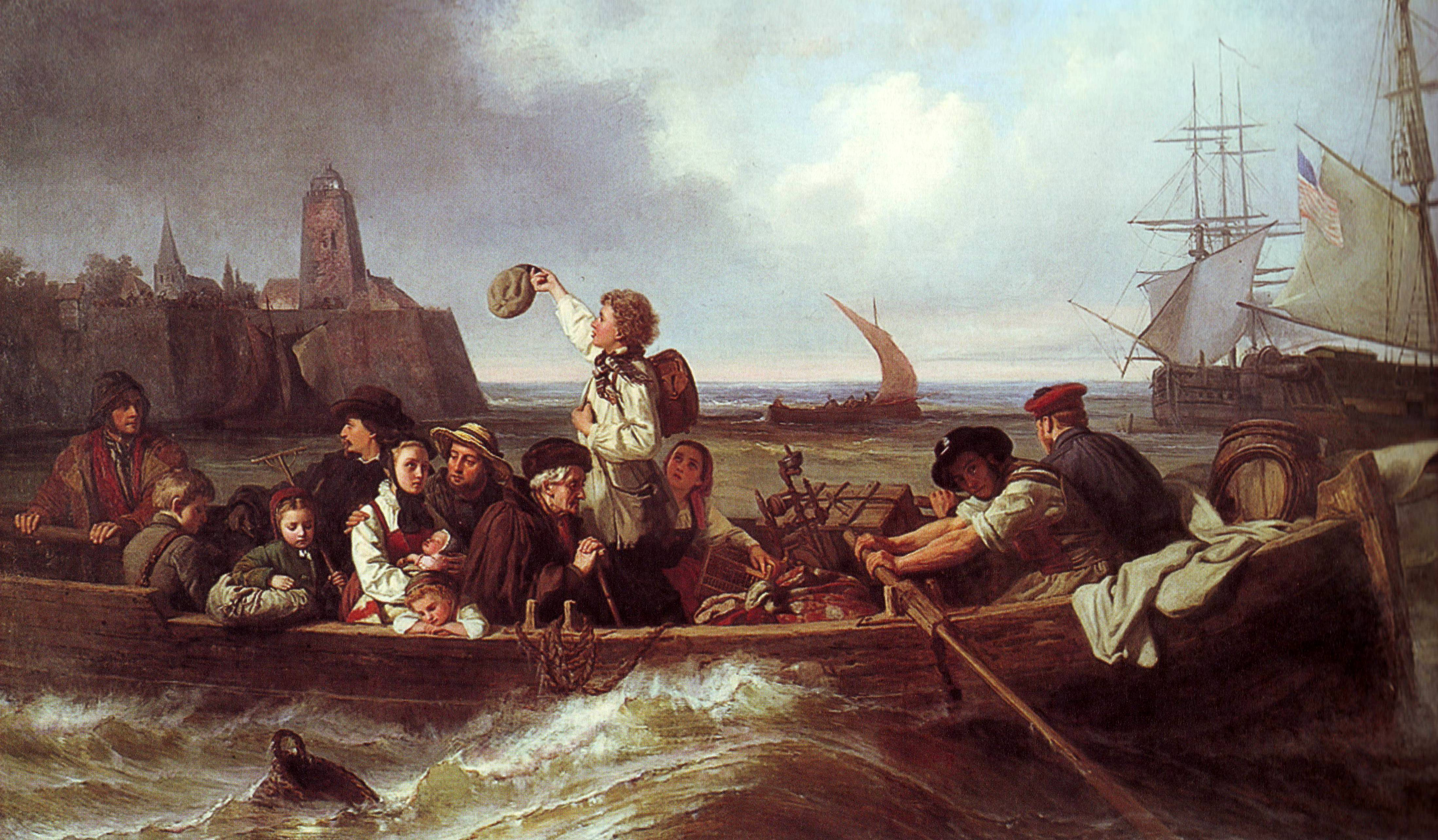 Öl auf Leinwand, Antonie Volkmar, 1860. “Abschied der Auswanderer”